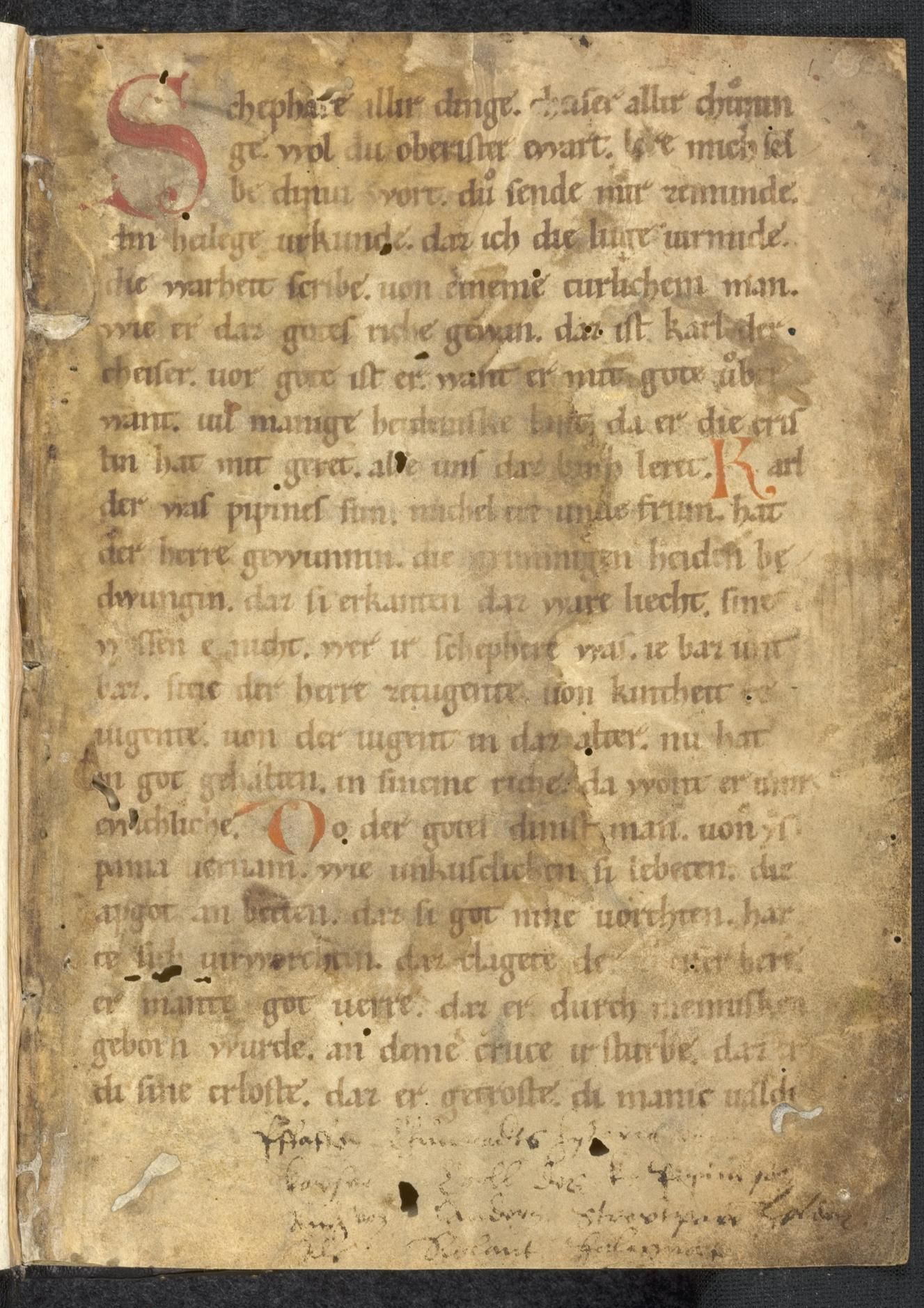 Rolandslied des Pfaffen Konrad. Übersetzung bzw. Bearbeitung der altfranzösischen Chanson de Roland (um 1100). Blatt 1r